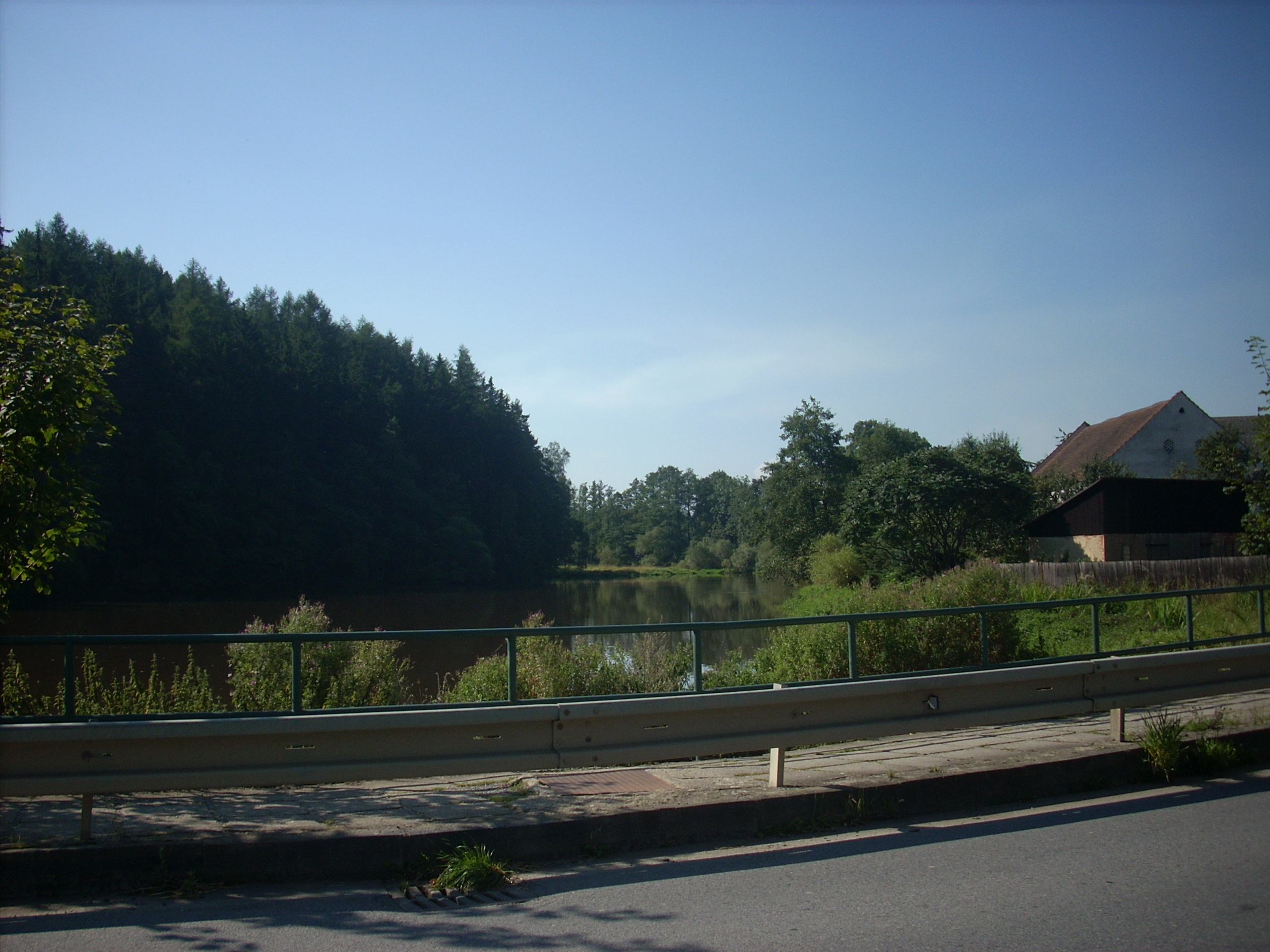 Obecní rybník, Střítež, okres Jihlava